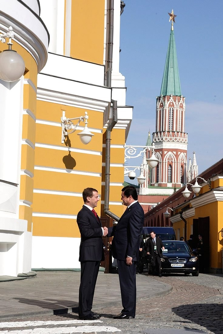 С Президентом Туркменистана Гурбангулы Бердымухамедовым.